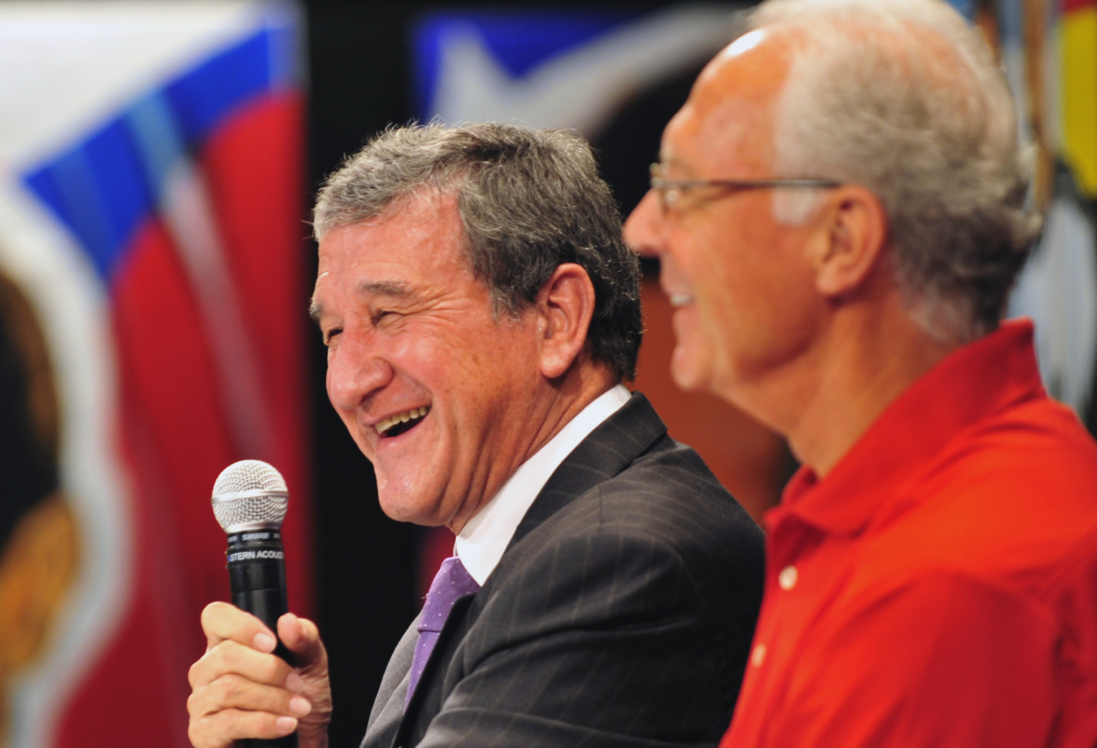 Joanesburgo (África do Sul) - O técnico da África do Sul Carlos Alberto Parreira e o ex-jogador alemão Franz Beckenbauer apresentam as bolas com os nomes dos times que jogarão a semifinal da Copa do Mundo.